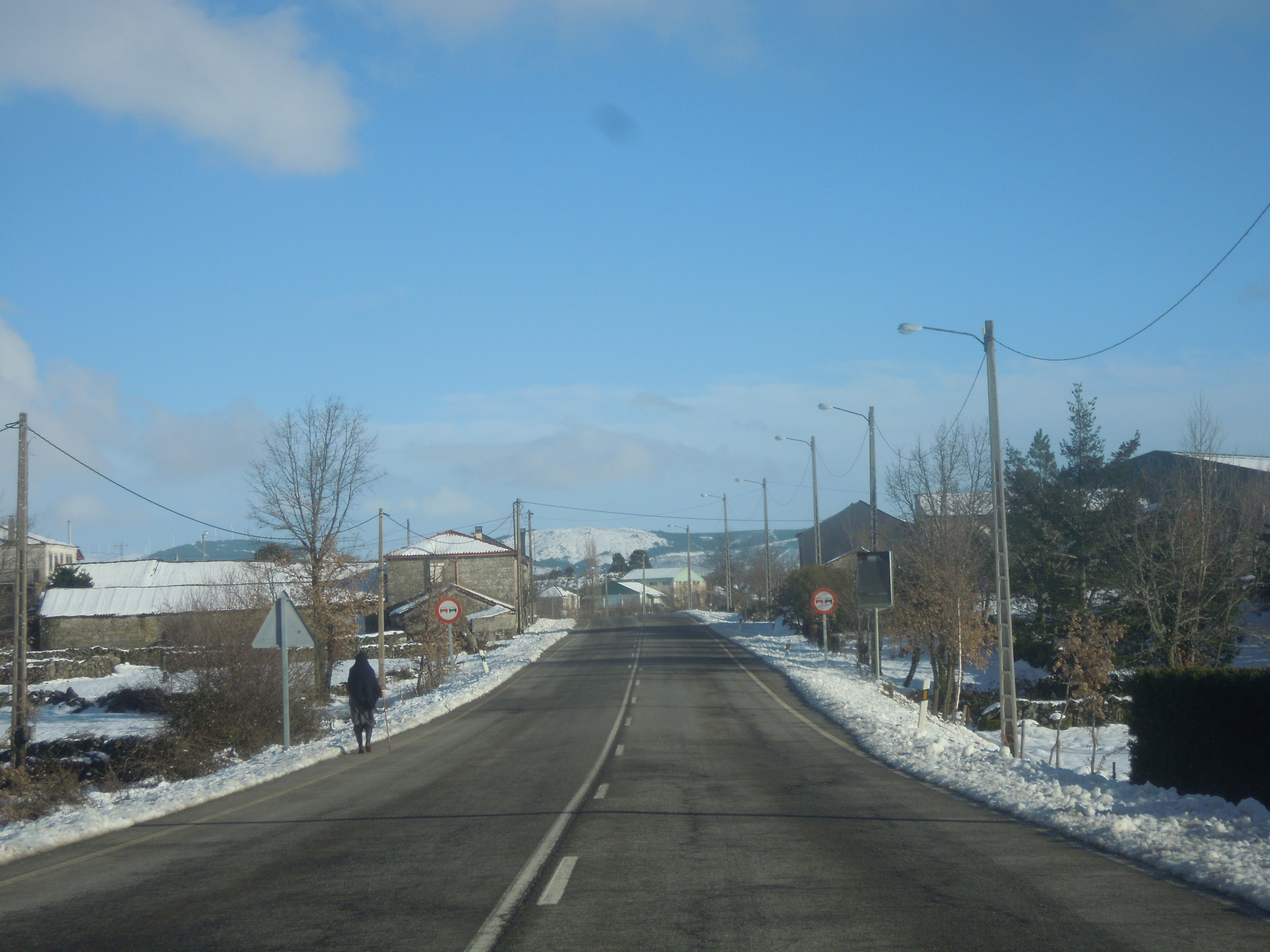 N-525 ao seu paso polo Canizo (A Gudiña)